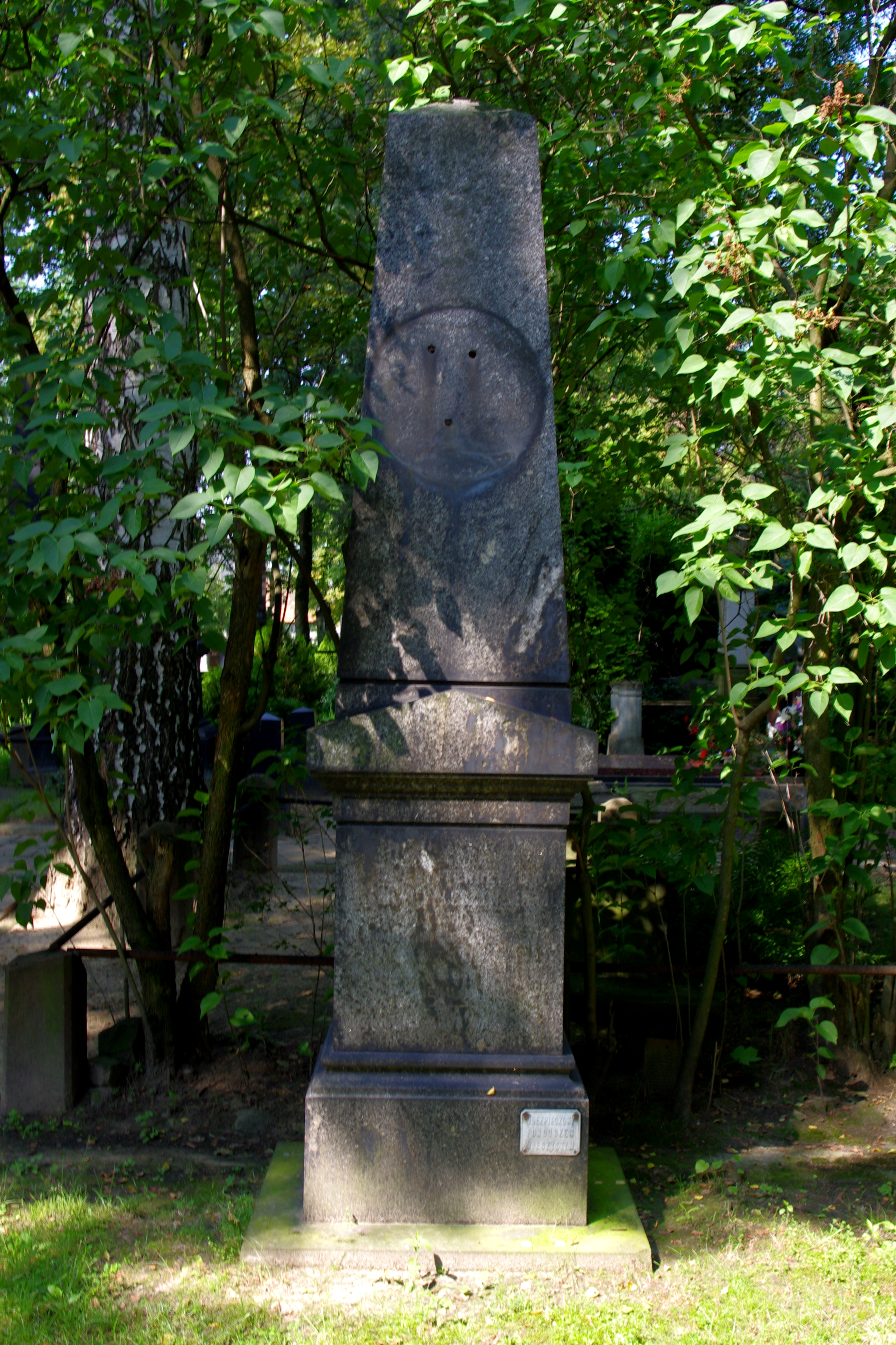 Grób superintendenta generalnego Kościoła Ewangelicko-Reformowanego w Królestwie Polskim - Józefa Spleszyńskiego na cmentarzu reformowanym przy ul. Żytniej w Warszawie